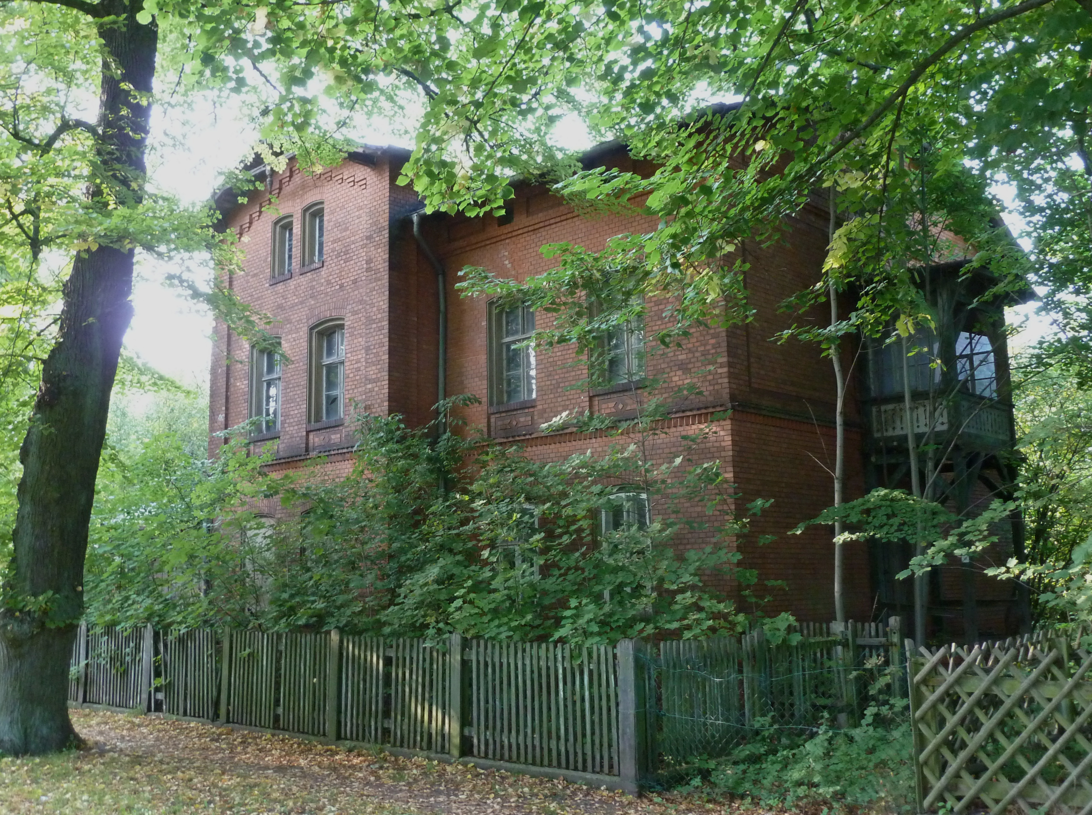 Bahnhof Wiesenburg (Mark),denkmalgeschütztes Eisenbahnerwohnhaus am Bahnhof, Adresse:Am Bahnhof 41